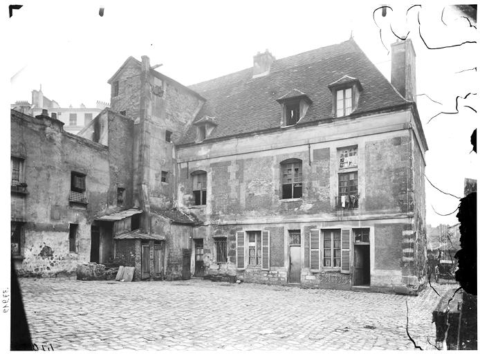 Façade sur cour